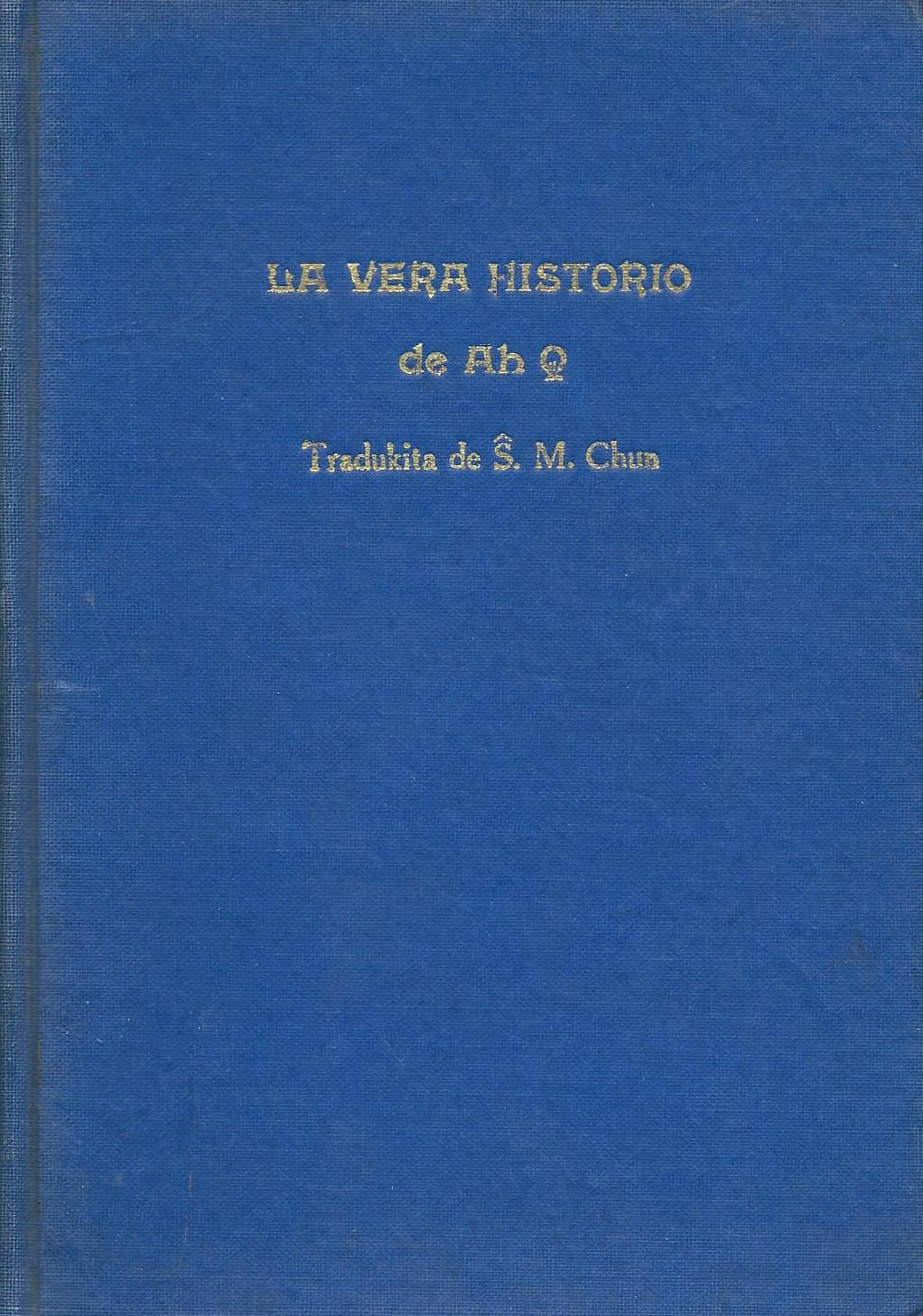 librokovrilo de "La Vera Historio de Ag Q", 1930